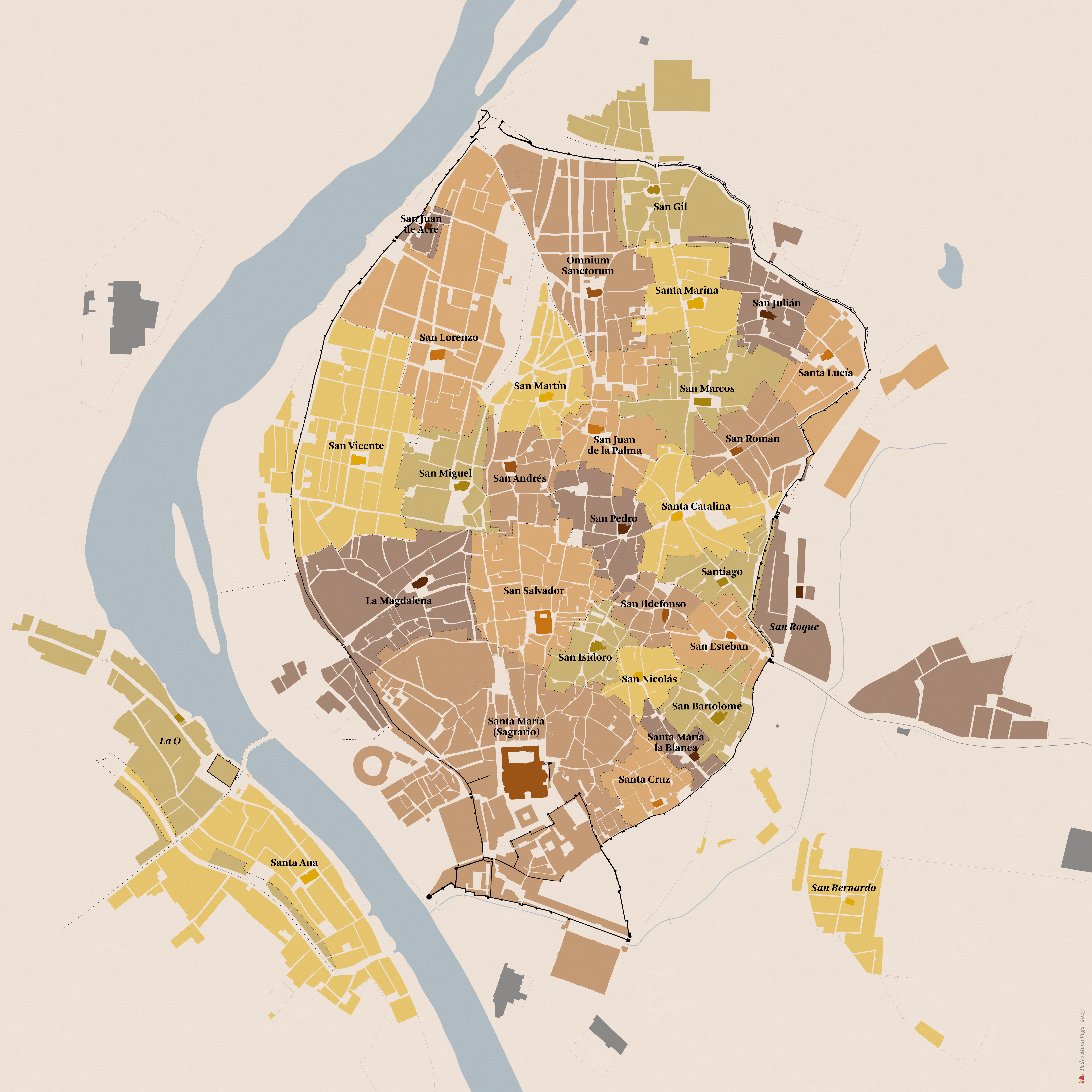 Plano de la división de Sevilla en 27 parroquias, 3 ayudas y la jurisdicción exenta de San Juan de Acre. Esta organización tuvo su origen en la reconquista cristiana de la ciudad en 1248 y tomó su forma definitiva tras la desaparición de la judería a finales de la Edad Media. La base del mapa es una digitalización del plano levantado por Francisco Manuel Coelho para el asistente Olavide, que representa la ciudad en 1771. Las líneas de división son las recogidas en la Guía Zarzuela de 1875.